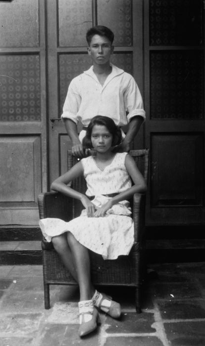 foto. Portret van twee Indo-Europese kinderen